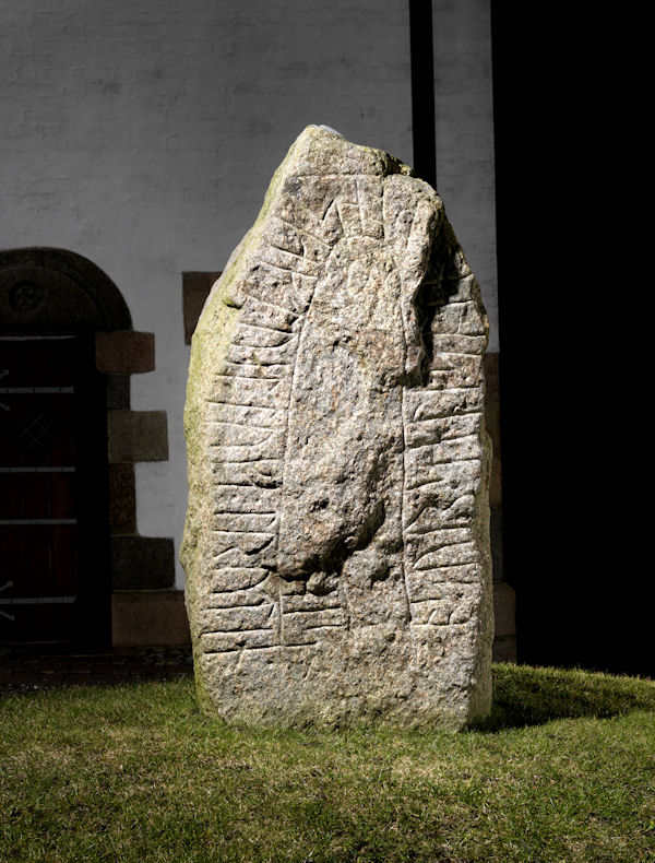 Foto: nationalmuseet ved Roberto Fortuna